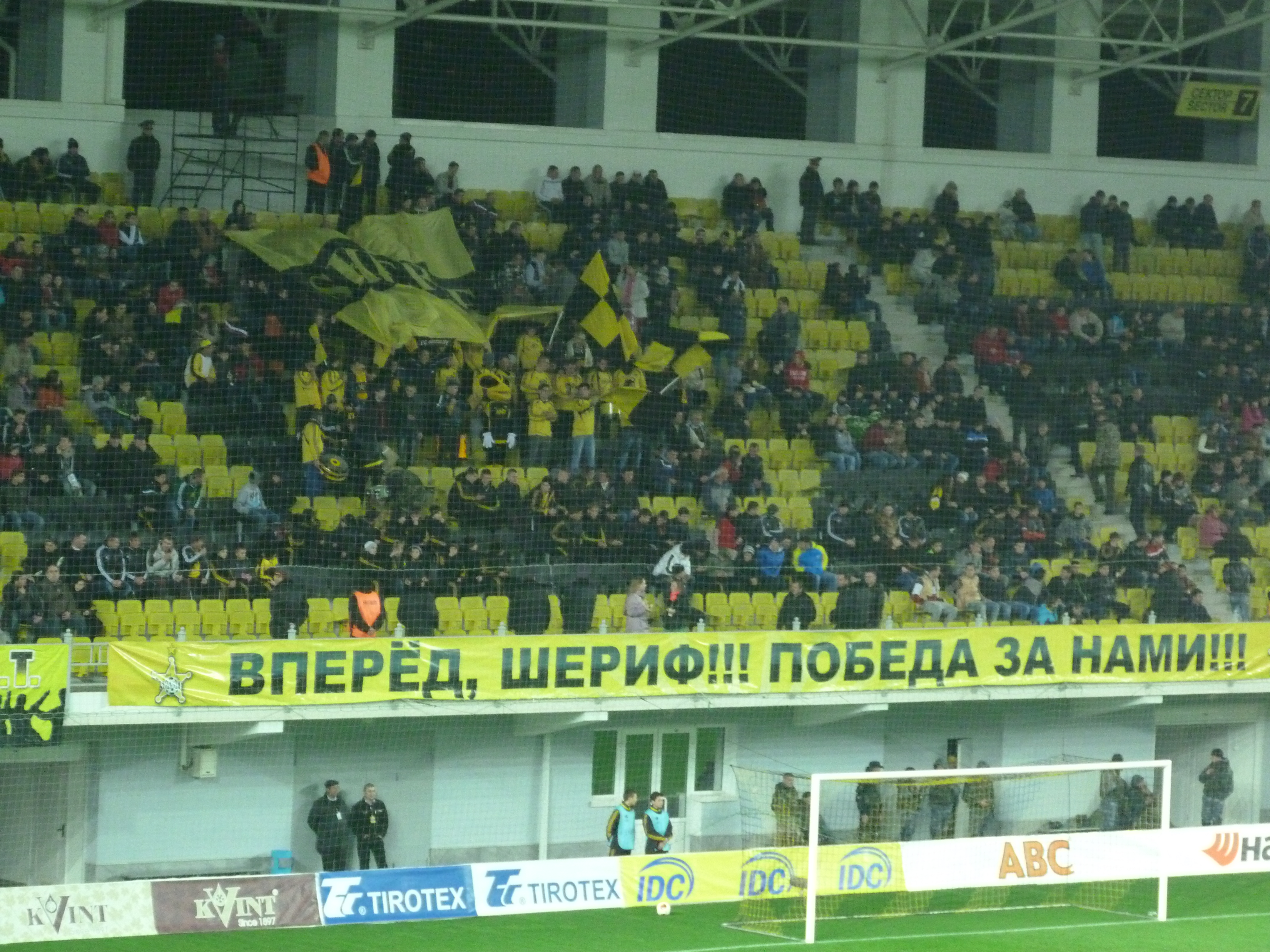 Sheriff Tiraspol fans. 24 oct 2013